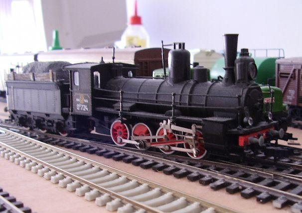 Модель паровоза Ов-724